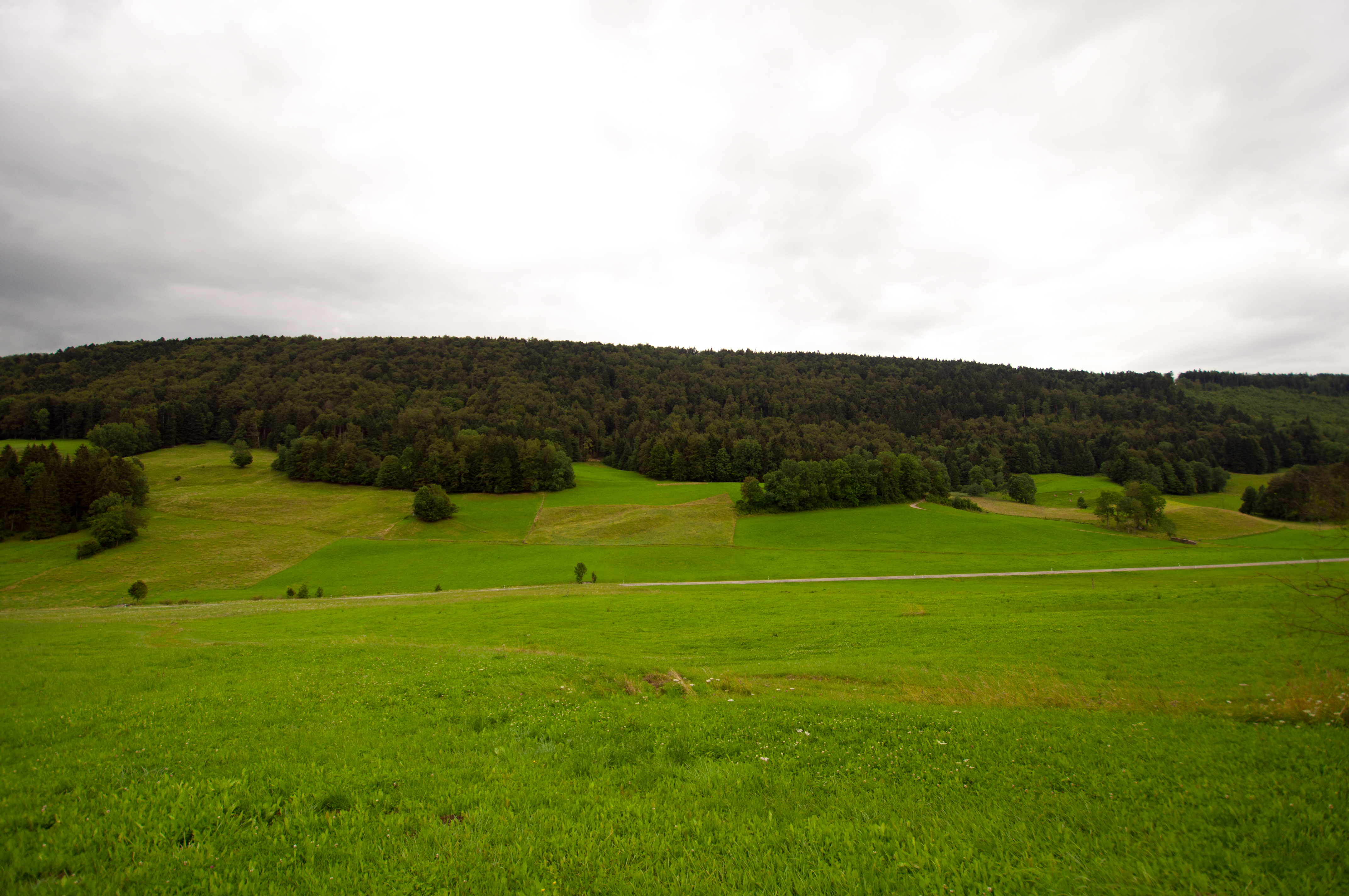 Forêts du Beucle (mittelalterliches Eisenbergwerk)